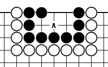 刀把五(圍棋)